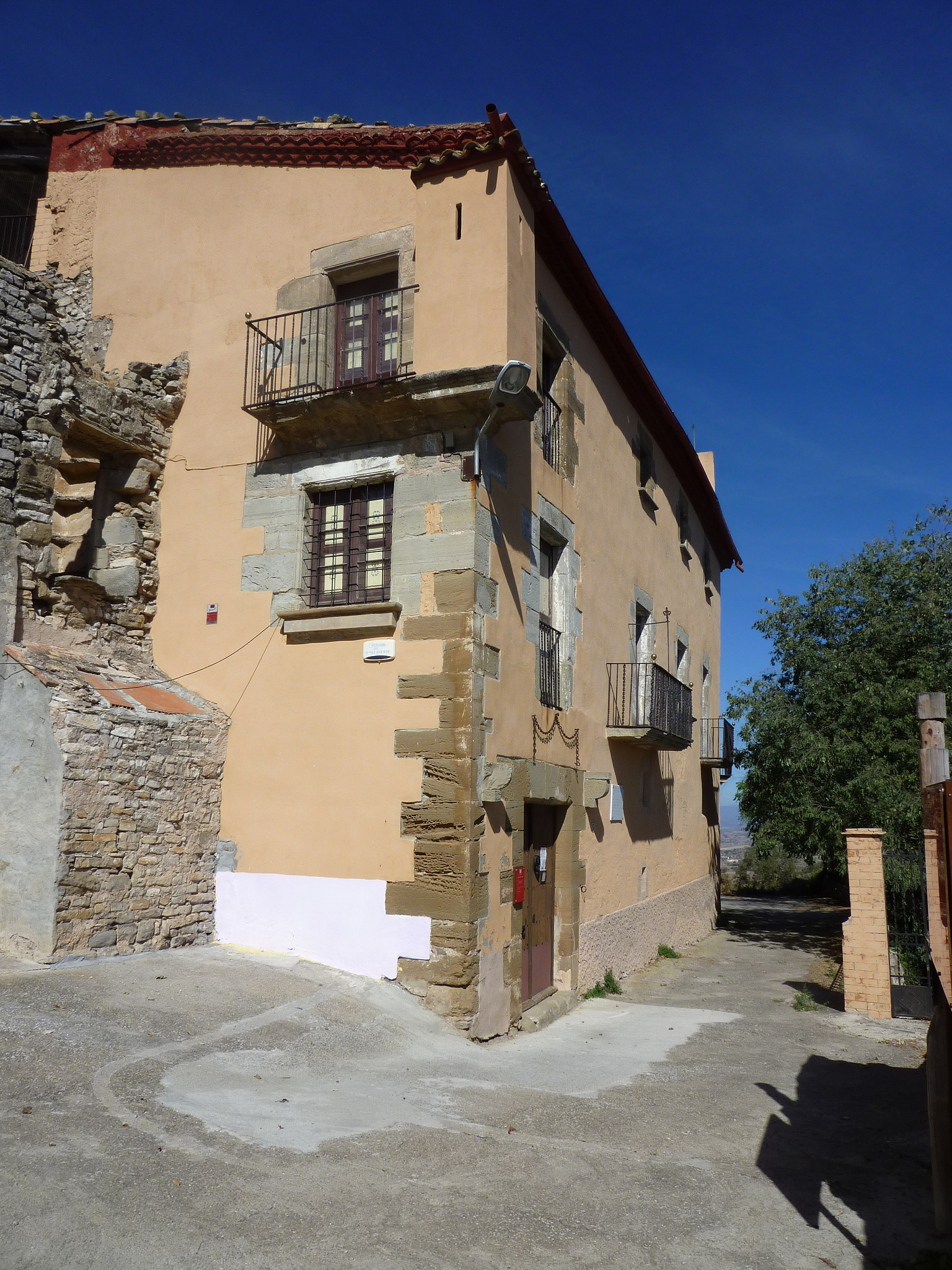 Castell de Vicfred (Sant Guim de la Plana)